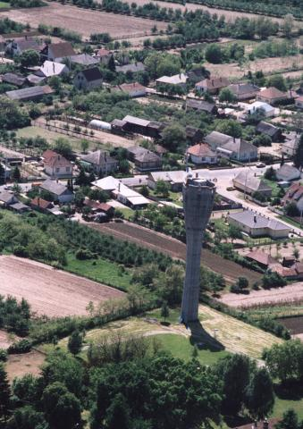 Kállósemjén, Hungary, aerial photography